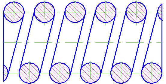 lineární vinutá tlačná pružina